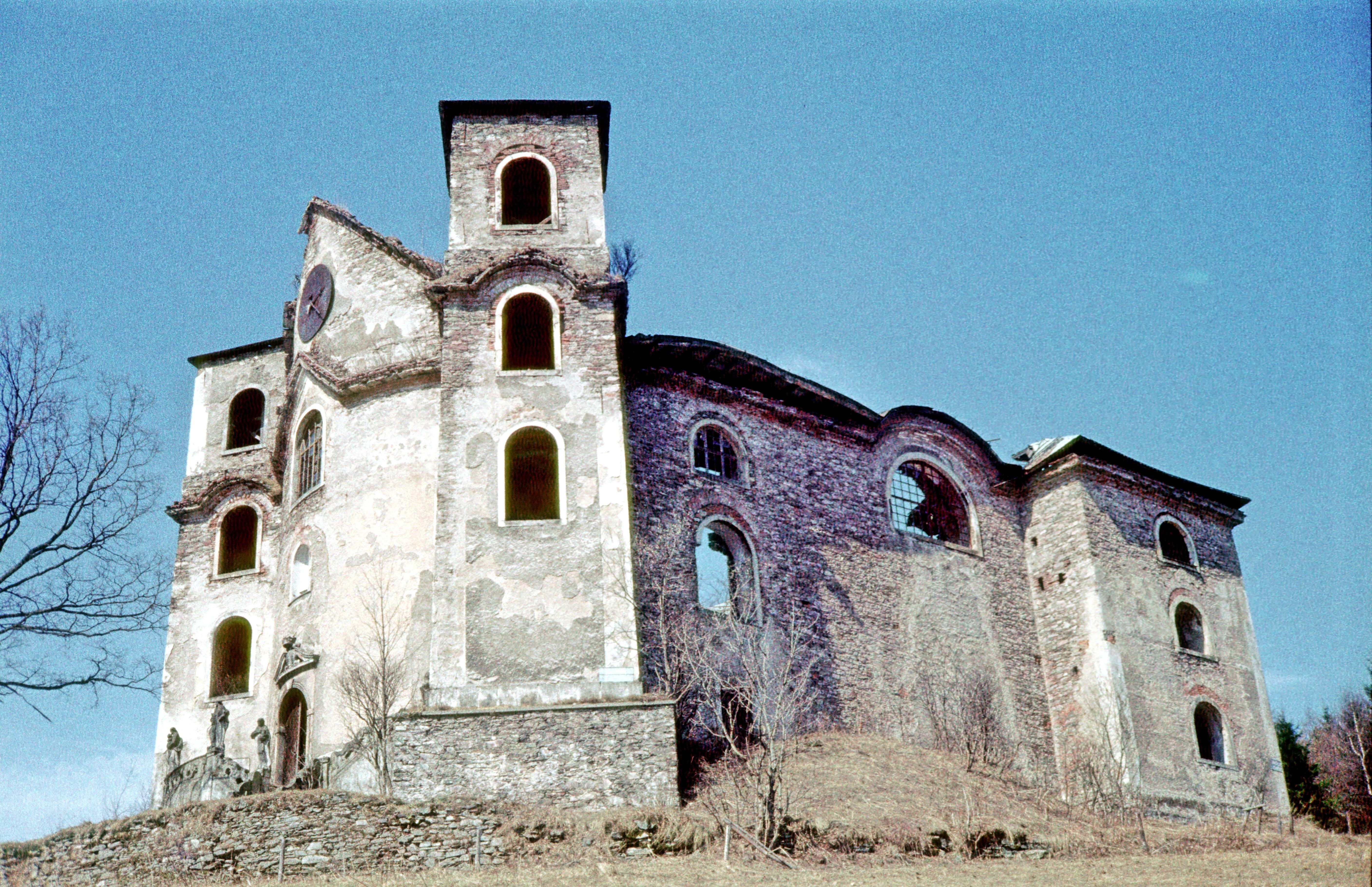 Kostel Neratov někdy v 70. letech v předjaří